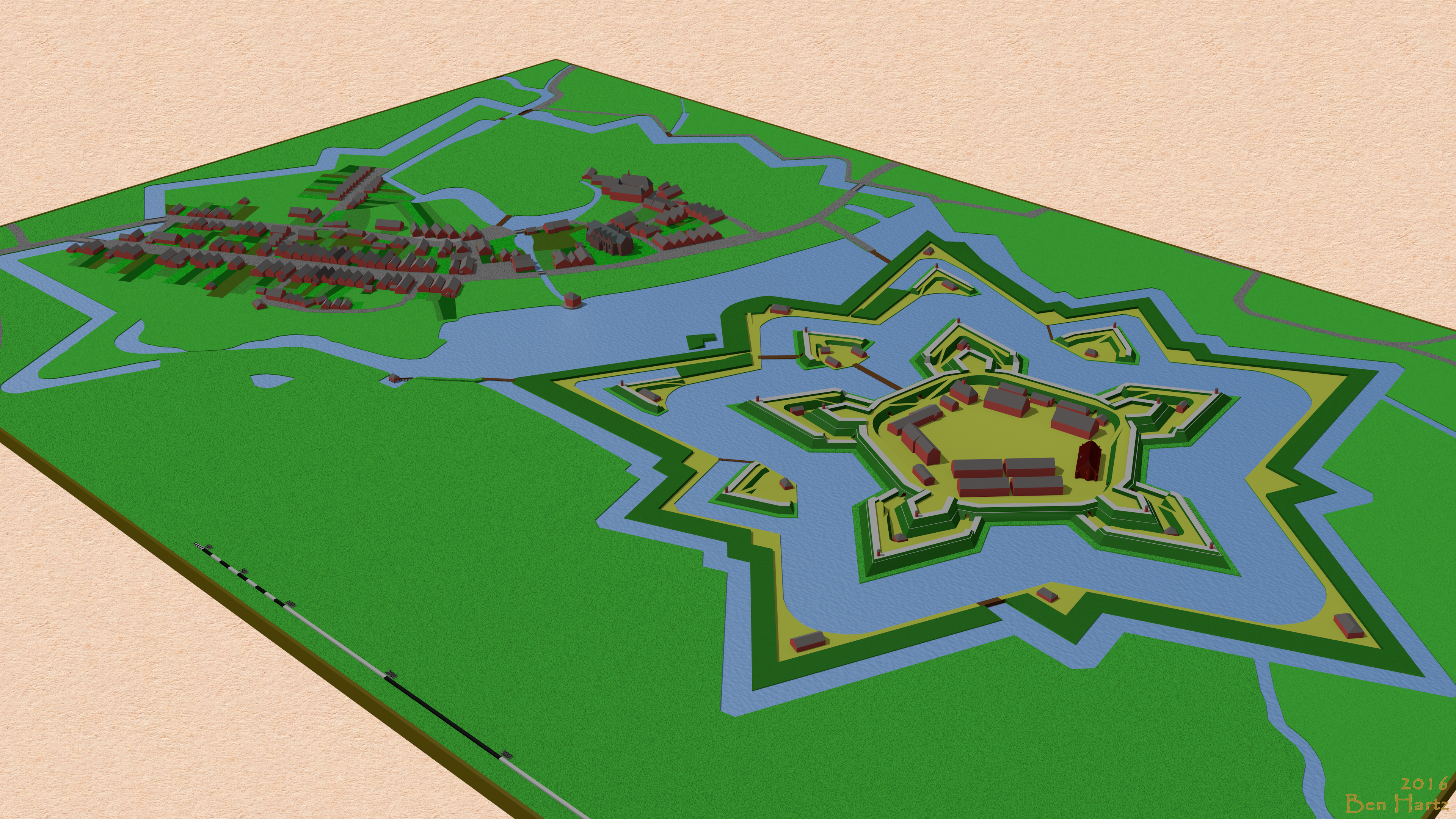 Modell der Festung und Stadt Vechta, ca. 1715. Nach dem Brand 1684 wurde die Festung Vechta in eine Regulärfestung umgewandelt. Die ausgebaute Zitadelle liegt westlich der Stadt. In der Stadt wurden nach 1685 sämtliche Anlagen, die ein Feind nutzen könnte, geschleift ("raisiert"). (Vorlage des Modells ist der Stadtplan von 1691, ergänzt um die Festungsansicht 1697 und das 1705 erbaute Kaponier.)